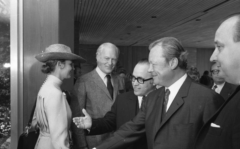 Bundeskanzler Willy Brandt empfängt Filmschauspieler